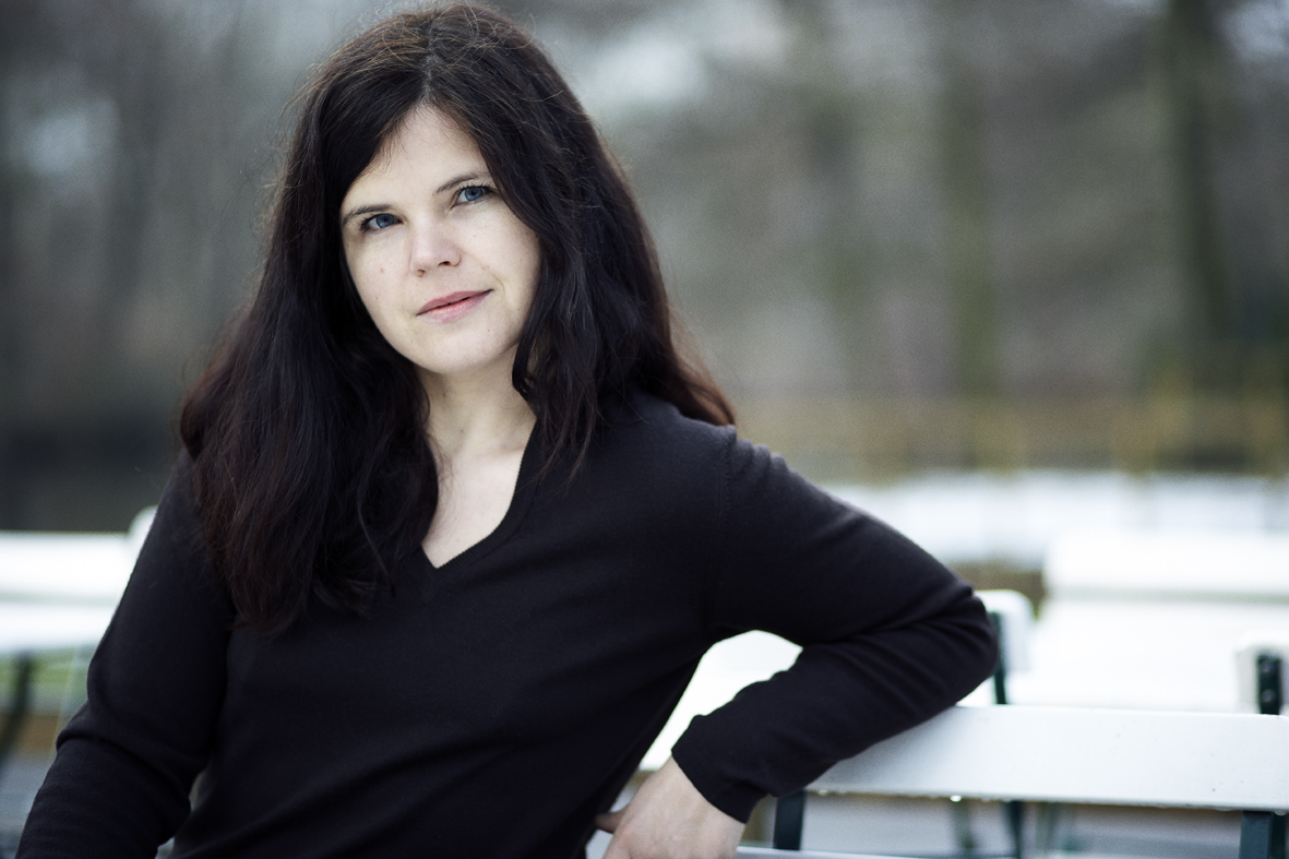 Porträt der Schriftstellerin Julia Franck